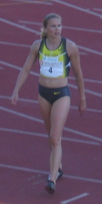 Johanna Halkoaho Paavo Nurmen kisoissa, Paavo Nurmen stadionilla, Turussa, 24. kesäkuuta 2009